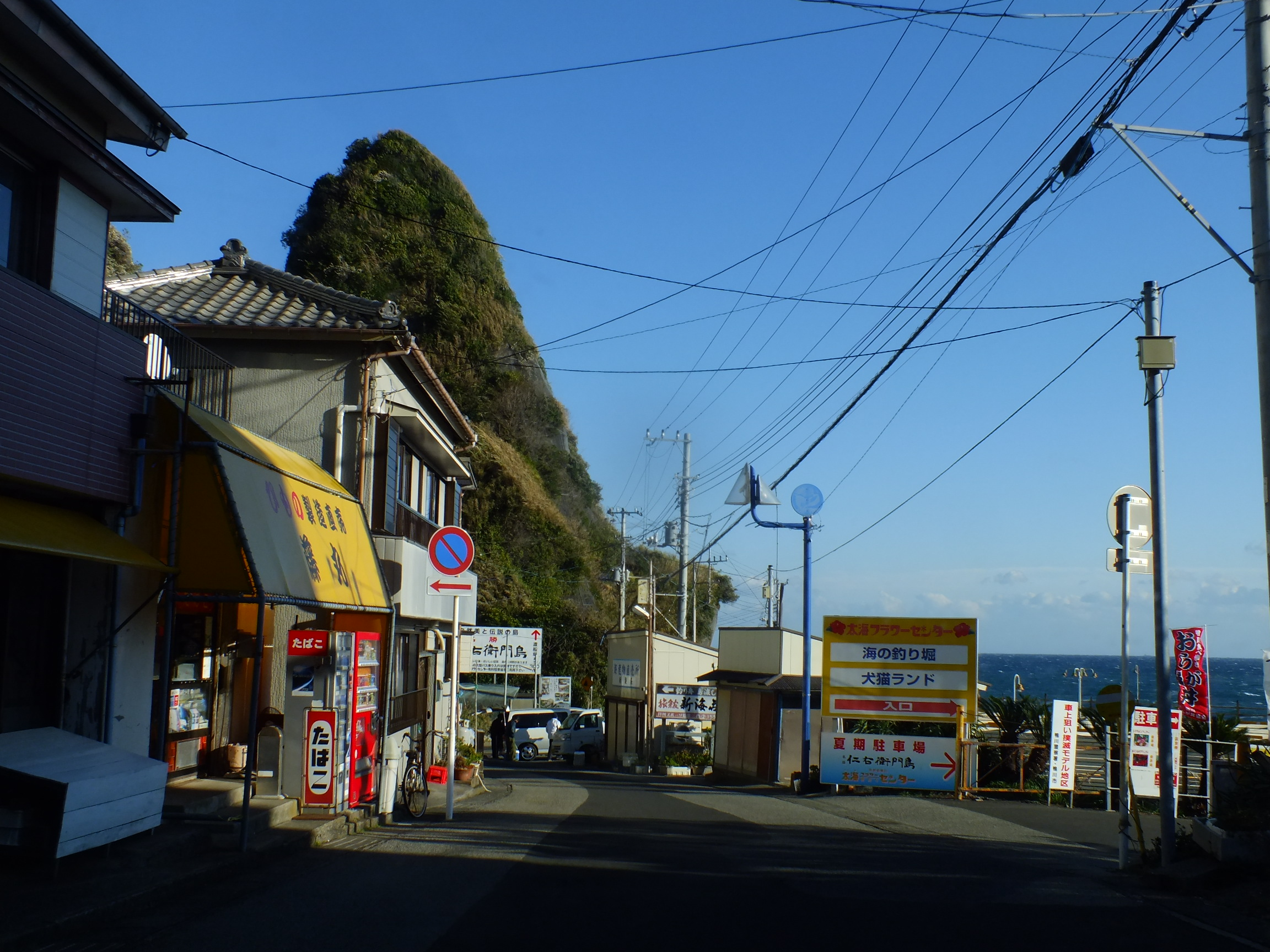 Futomihama,Kamogawa,Chiba 千葉県鴨川市太海浜